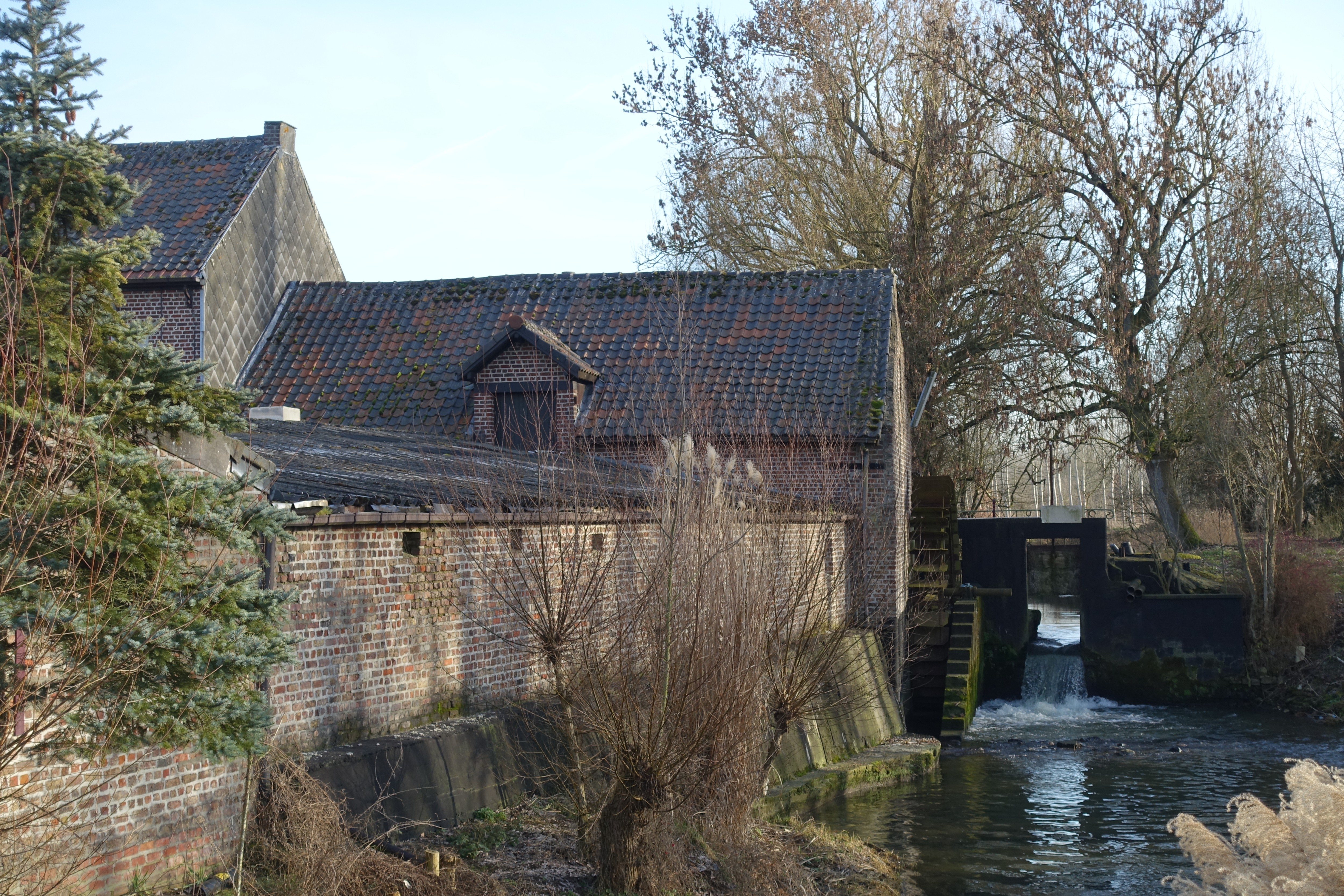 Elsbroekmolen of Binderveldmolen is een korenwatermolen op de Melsterbeek in Binderveld (Niewerkerken) reeds vermeld in 1379. Het huidige gebouw is van 1910 en werd verbouwd in 1937. Beschermd monument